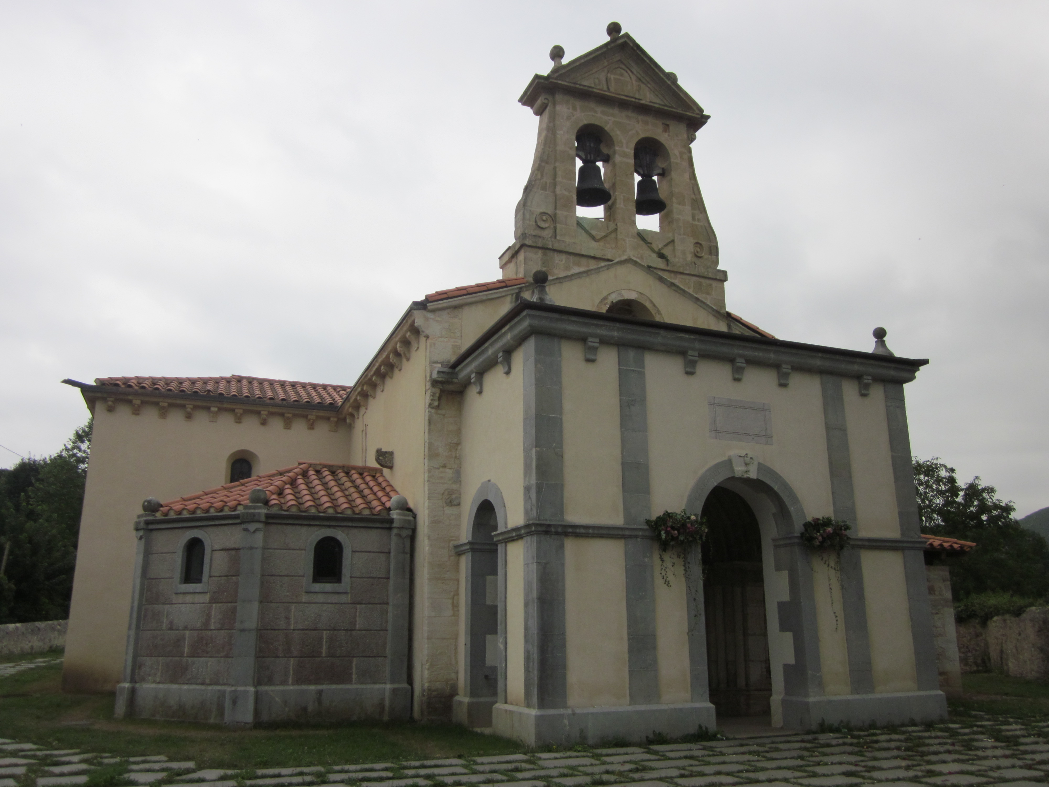 Iglesia de San Juan de Priorio. Las Caldas, Concejo de Oviedo, Principado de Asturias. España.